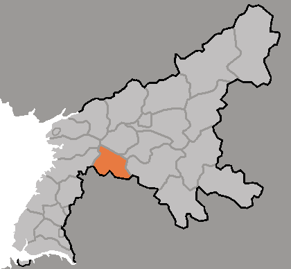 Map of Pyongsong, Pyongan-namdo, DPRK, 2006